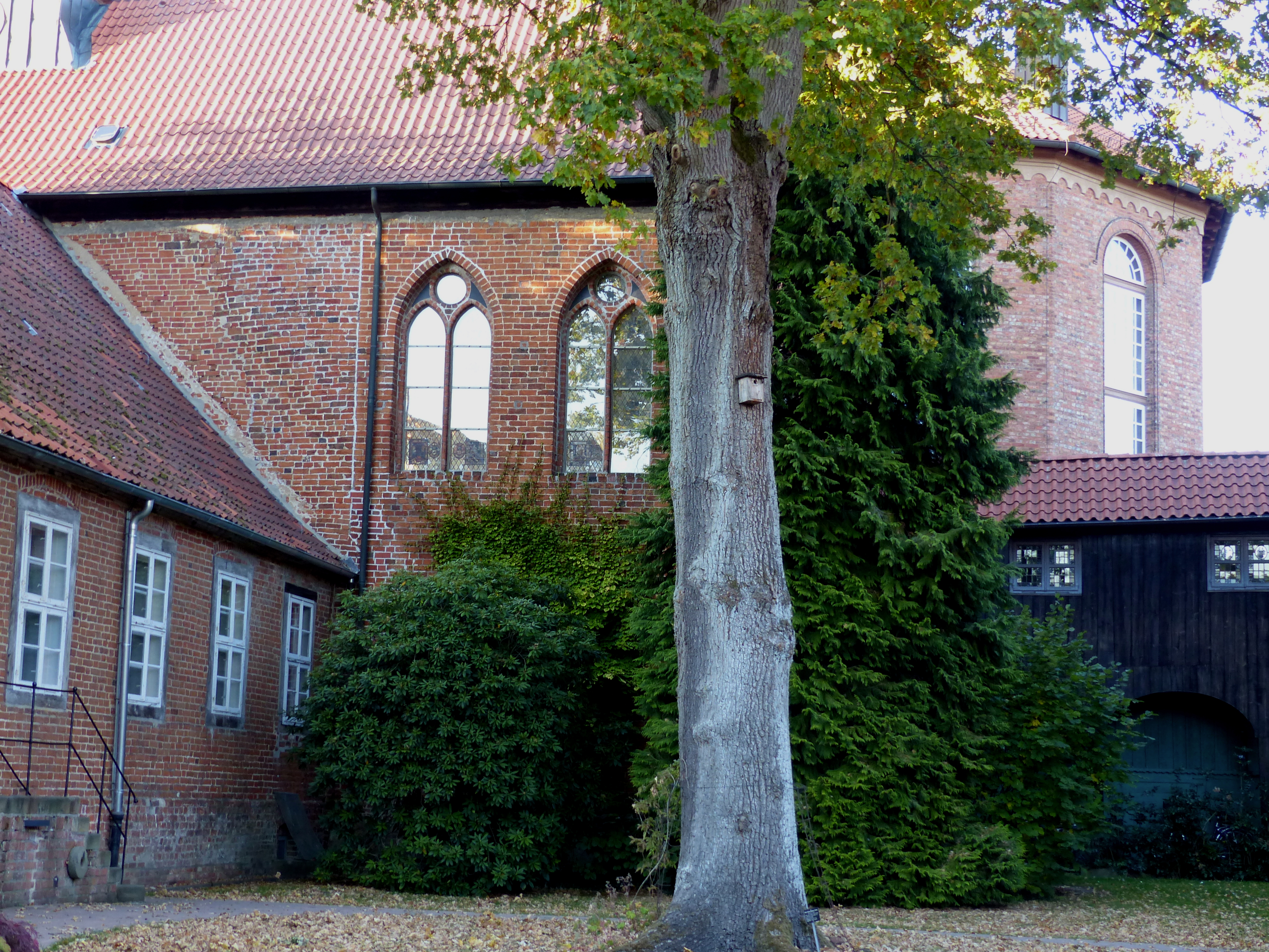 Kloster Walsrode, Klosterkapelle mit zwei gotischen Fenstern aus dem 16. Jh. (nach dem Brand von 1482), dahinter Chor der Stadtkirche (um 1850)